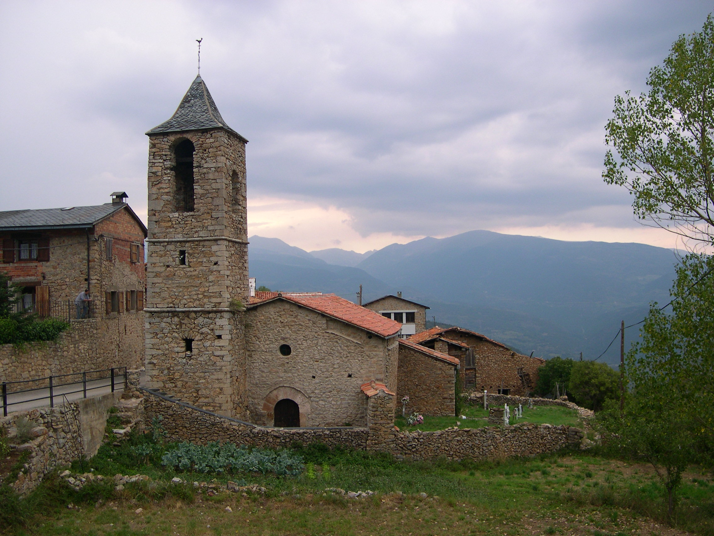 Església de Sant Climent (Montellà i Martinet) Object location42° 19′ 15.7″ N, 1° 39′ 45.2″ E